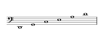 portée accord basse de viole